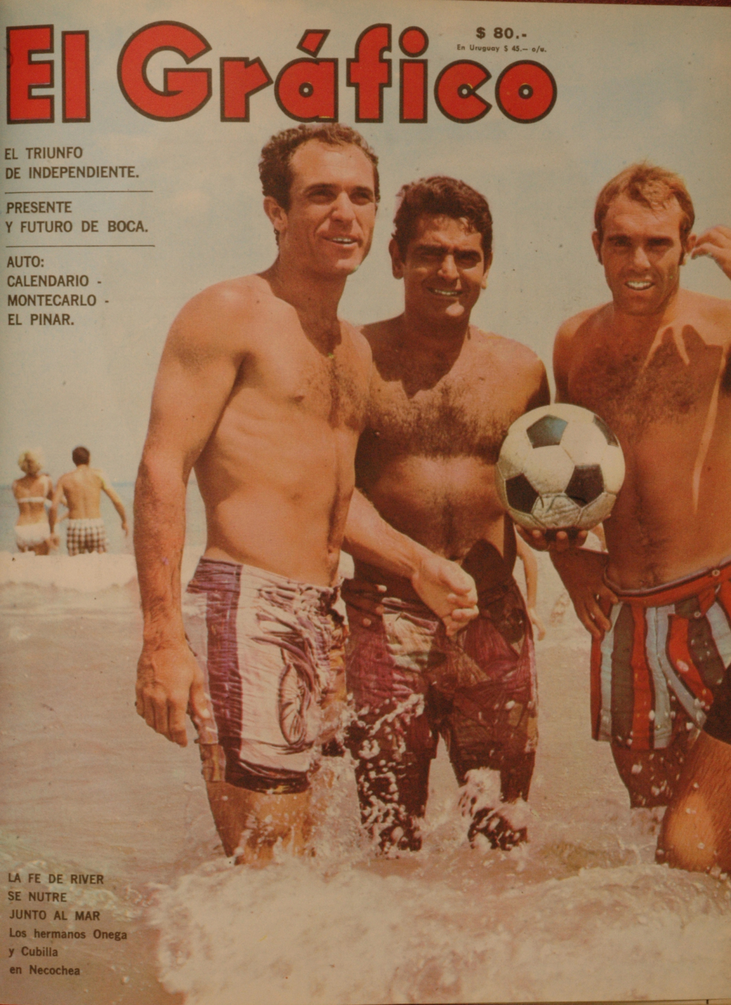 El Grafico del 06 de Febrero de 1968. Edicion 2522